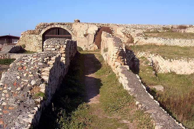 Villa di Pompeo a Marina di San Nicola (RM). Foto scattata da me.